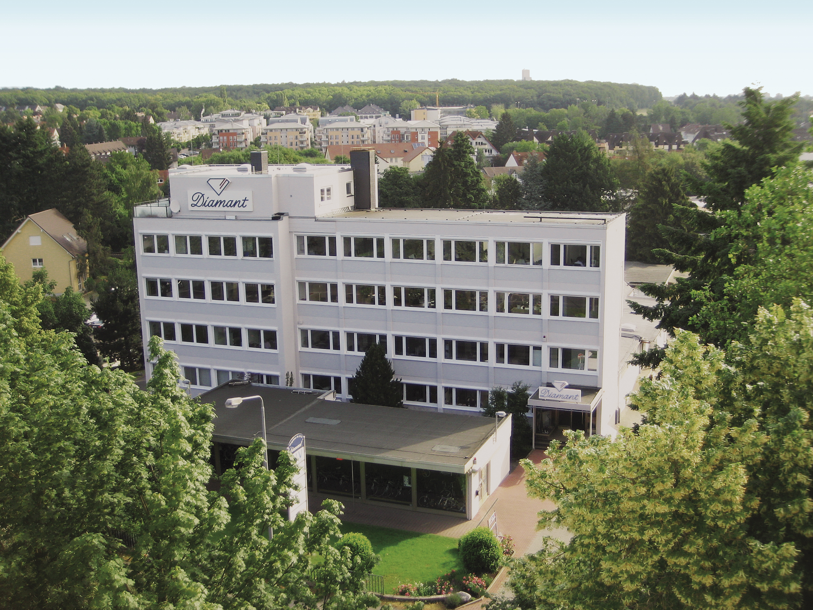 Firmengebäude der Firma Diamant Schuhfabrik Otto Müller KG in Bad Soden am Taunus